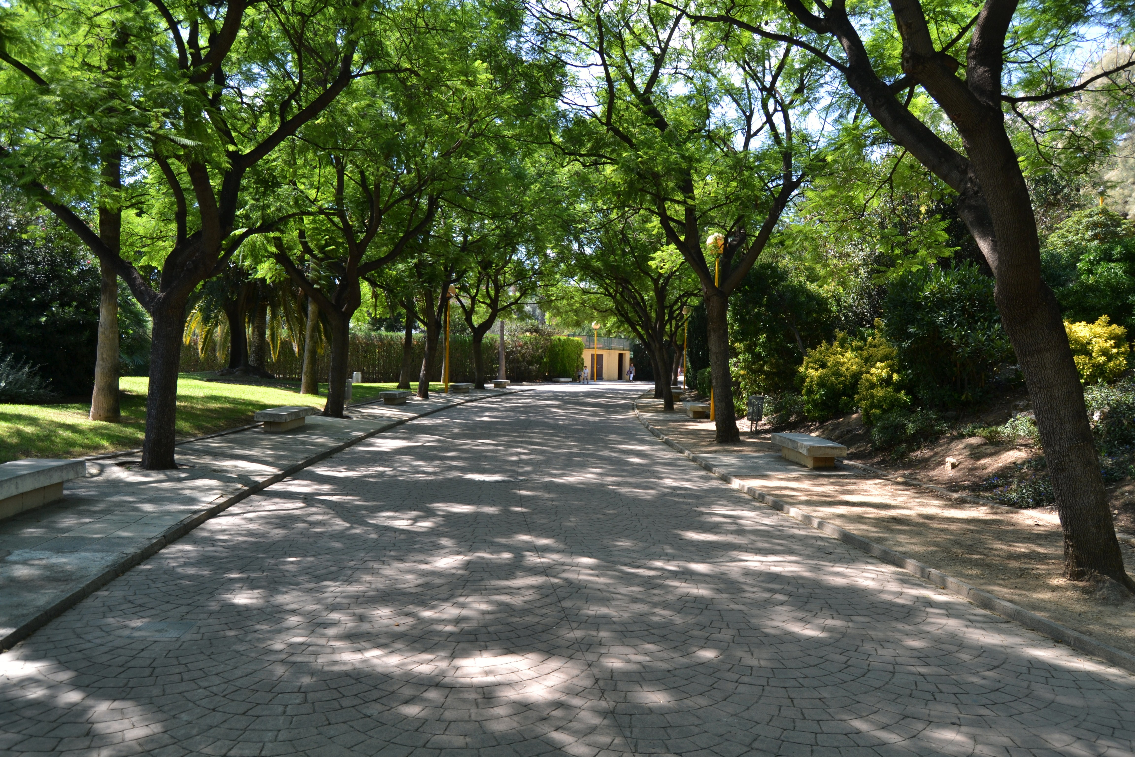 Passeig sota els arbres del parc de Benicalap.